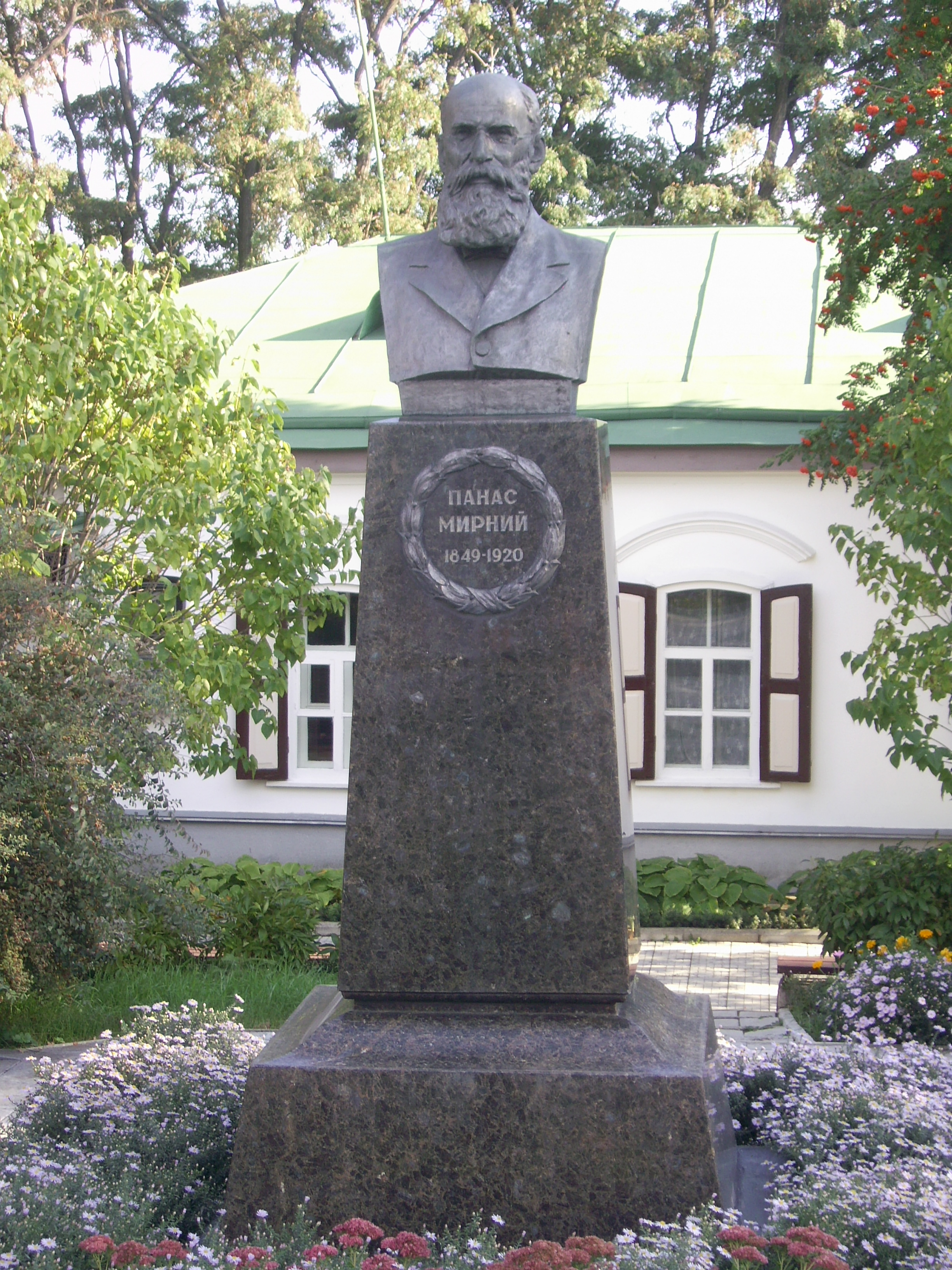 Пам'ятник-бюст Панасу Мирному